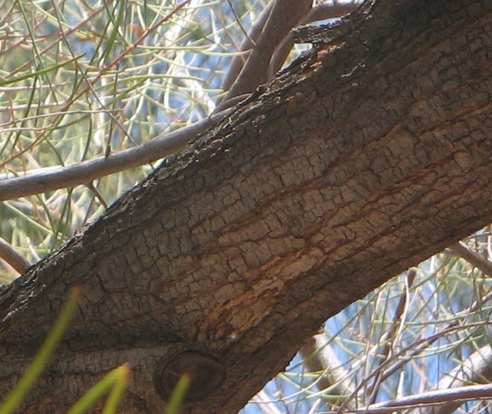 Acacia aneura Bark Arizona, USA